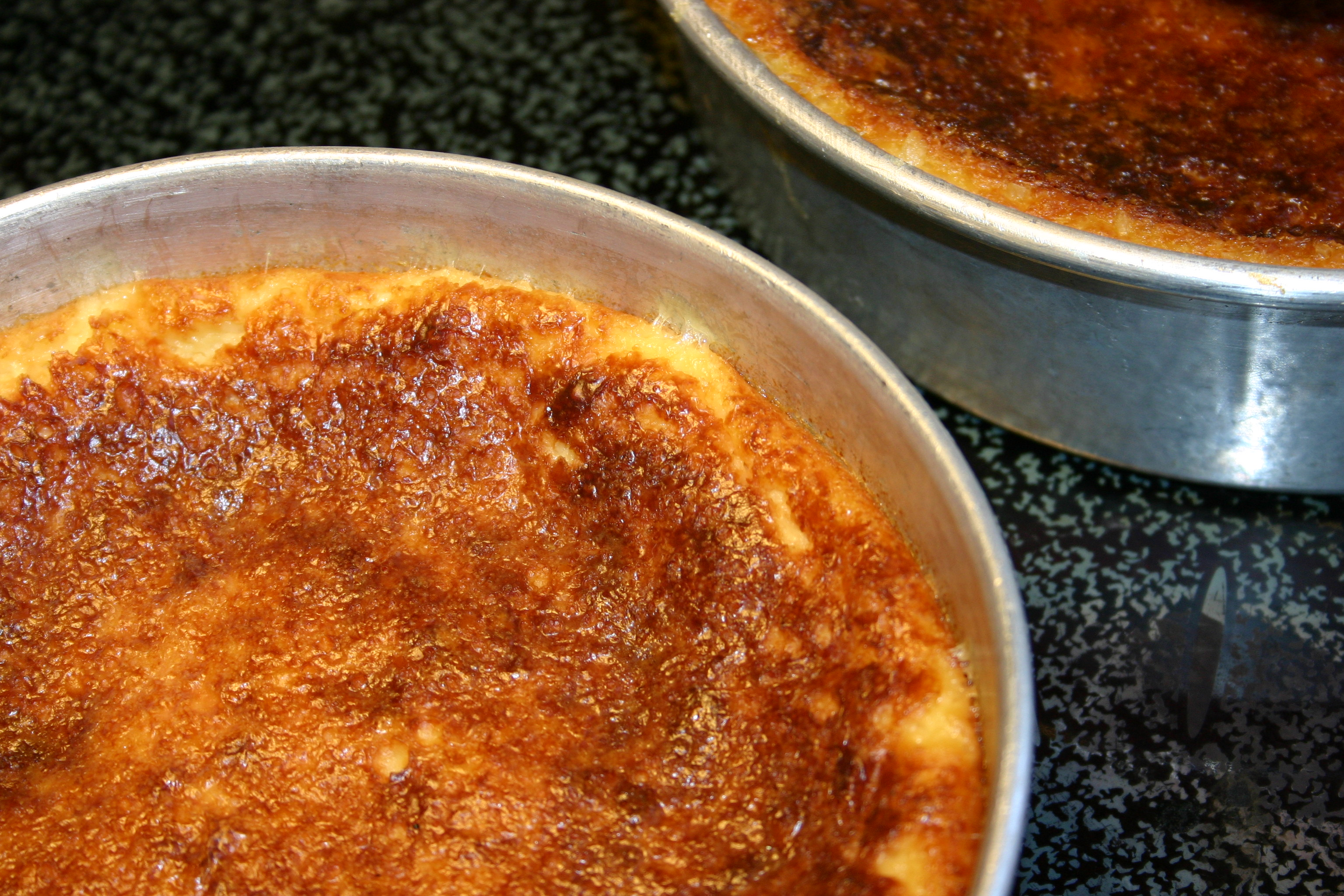 Swedish Ostkaka